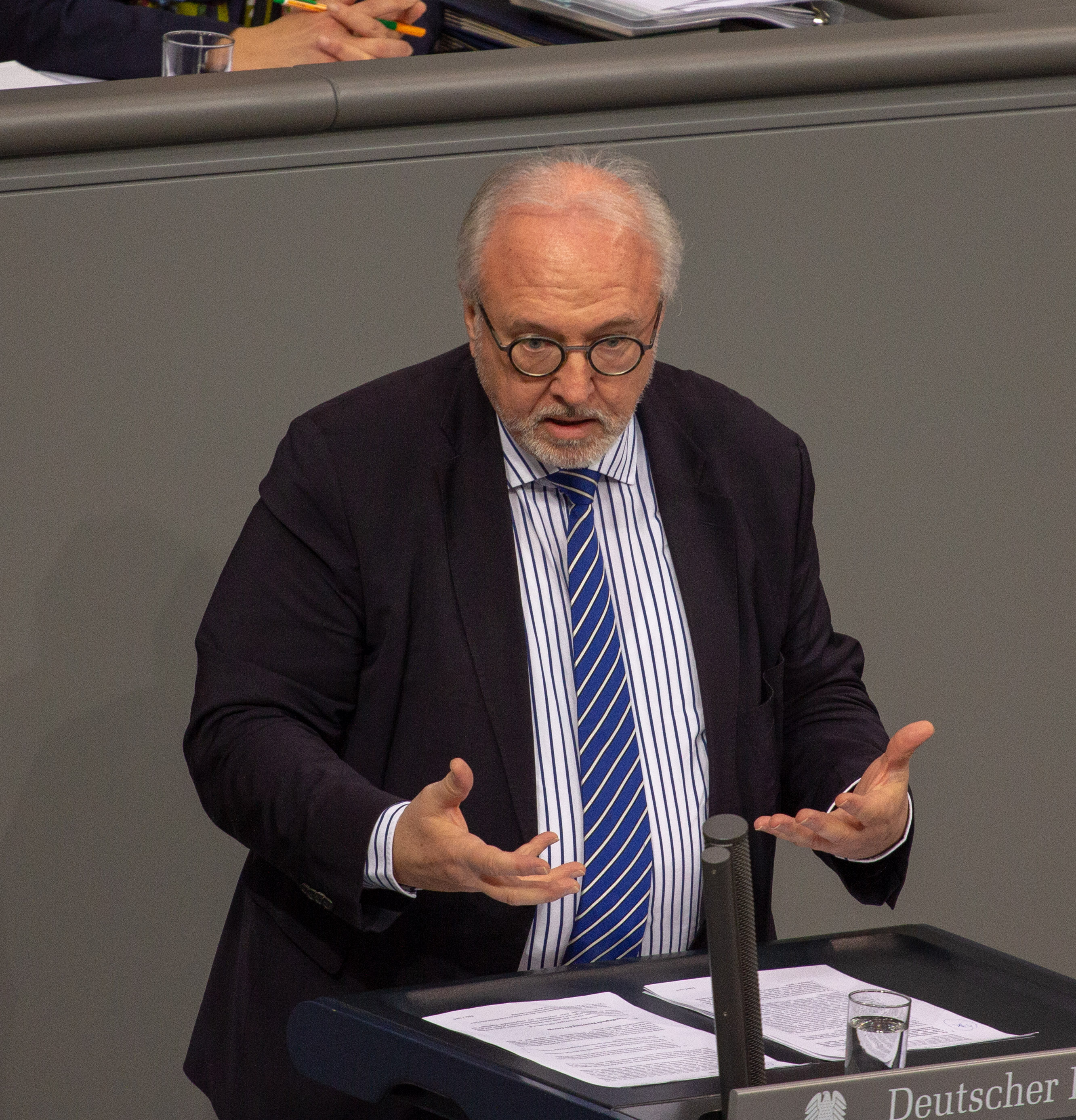 Rudolf Henke, Mitglied des Deutschen Bundestages, während einer Plenarsitzung am 11. April 2019 in Berlin.